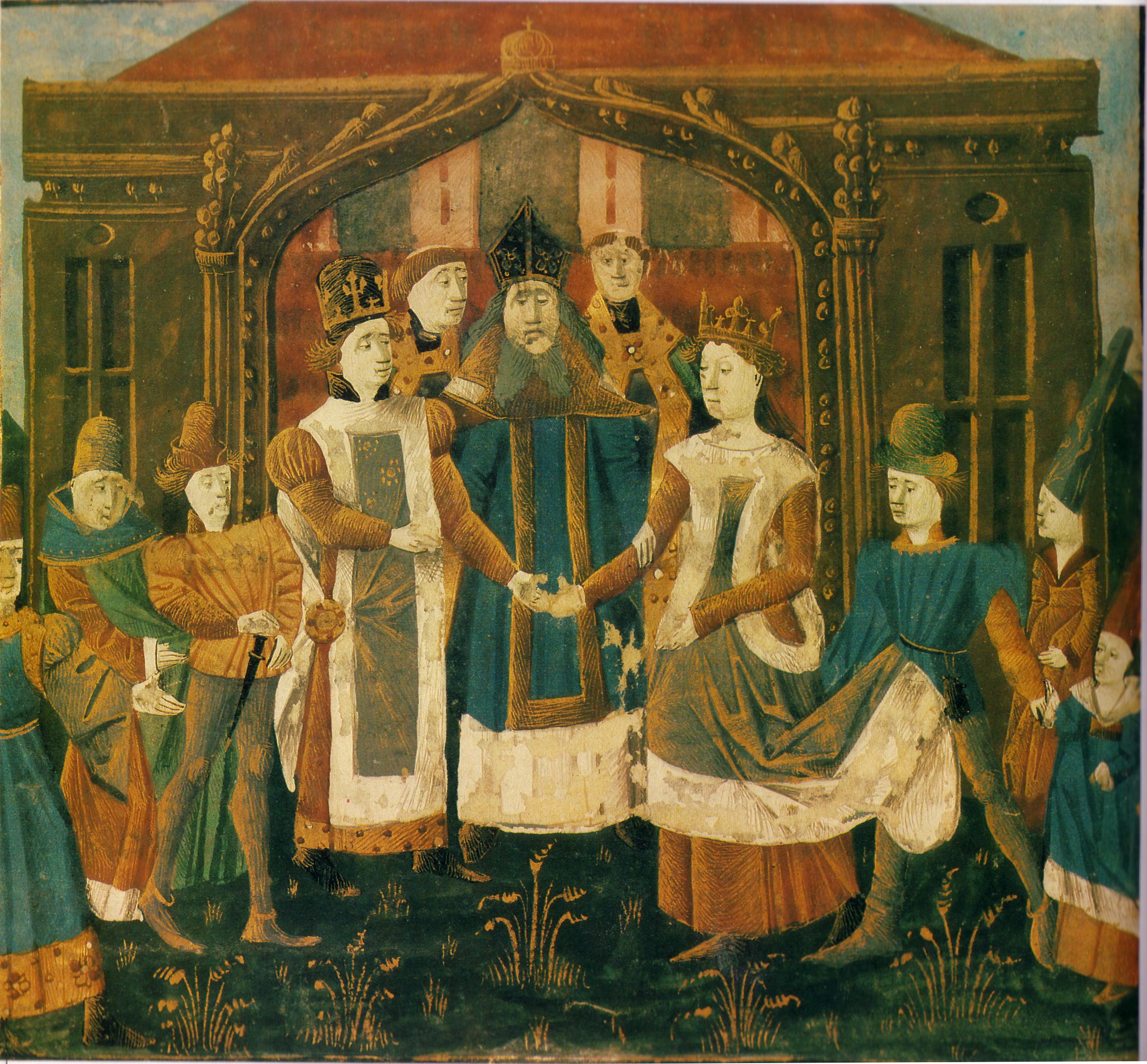 Mariage de Chilpéric Ier et Galsuinthe. Grandes Chroniques de France.